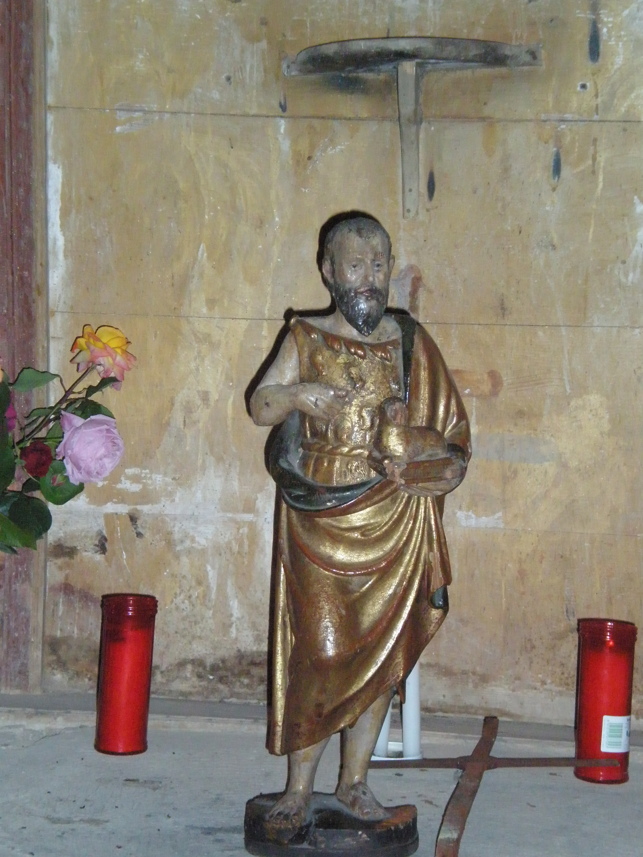 Imagen de San Juan custodiada en la iglesia de San Esteban de Villanúa y que se lleva a la ermita el día de la romería